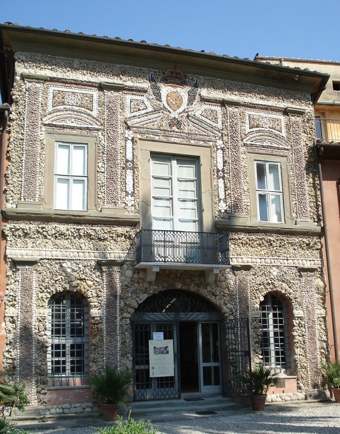 Antico Istituto di Botanica presso l'Orto Botanico dell'Università di Pisa. Oggi ospita la sezione storica dell'Orto.